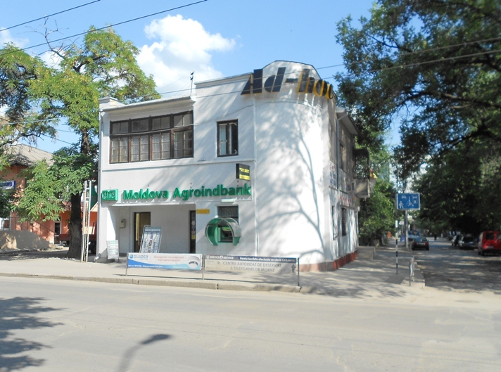 Filiala băncii Moldova Agroindbank din centrul orașului Bălți